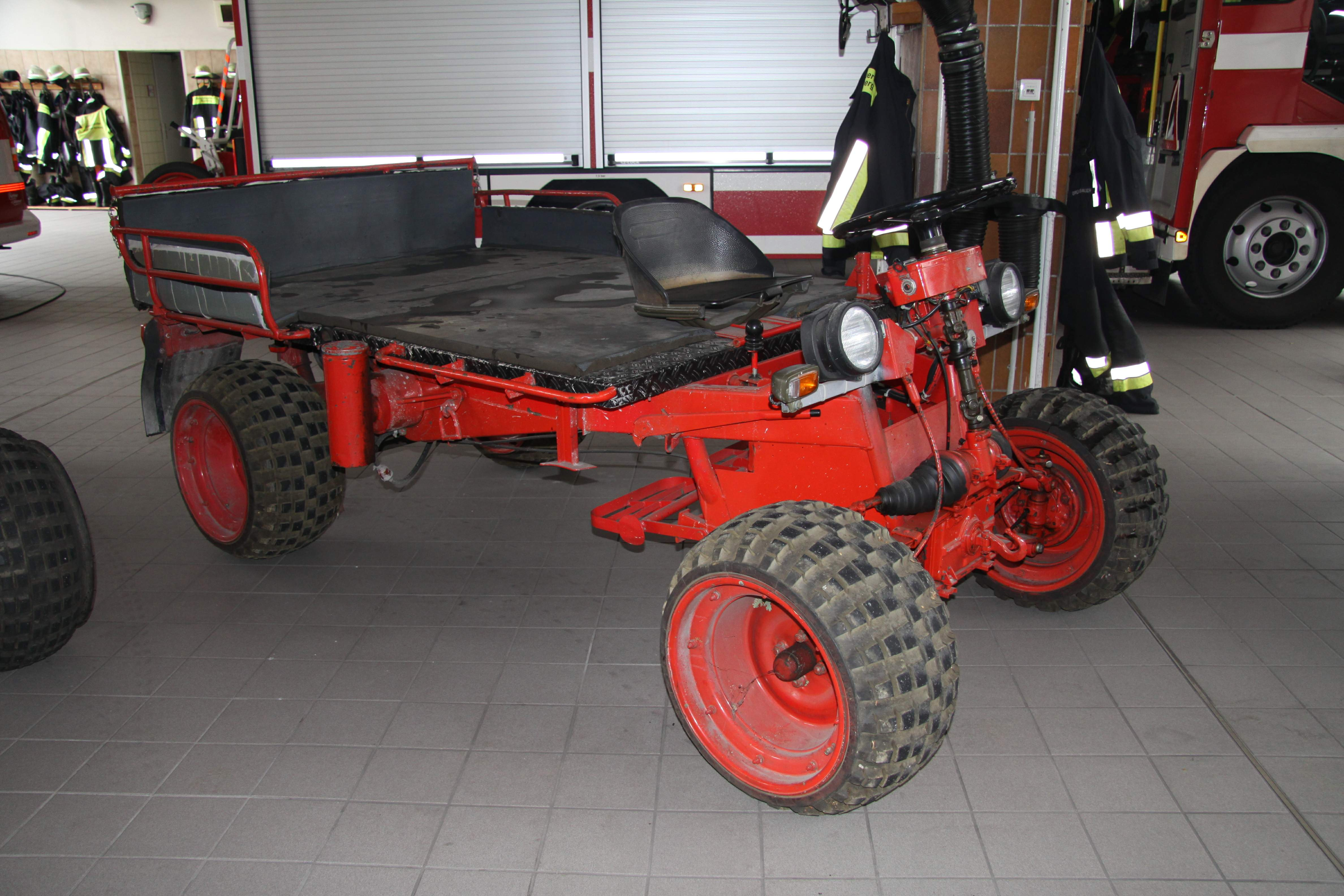 Kraftkarren (Hersteller: Zweirad Union AG NBG, ehemals Werkfeuerwehr FAUN)